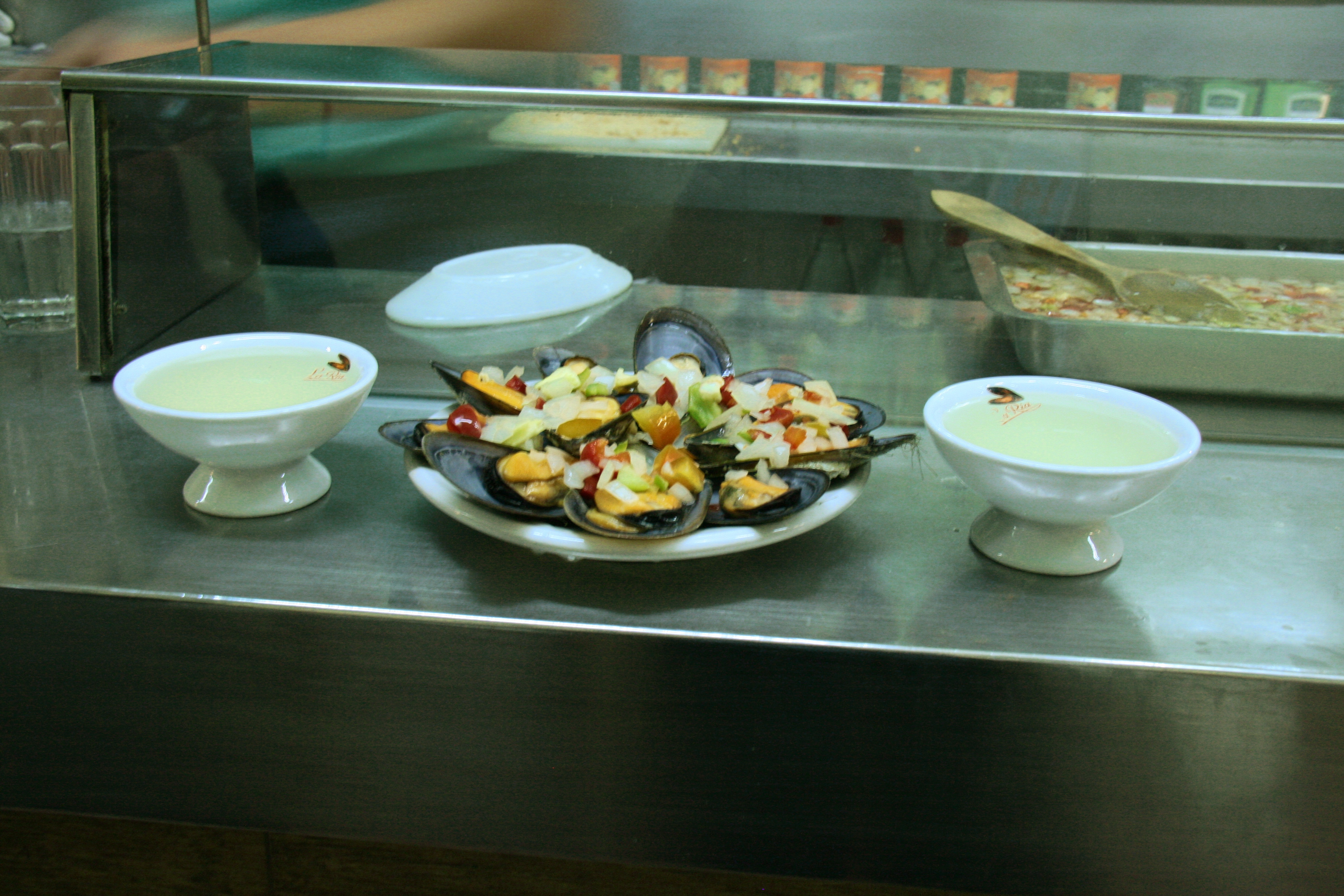 Ración de ribeiro con mejillones a la vinagreta (La Ría) -Madrid